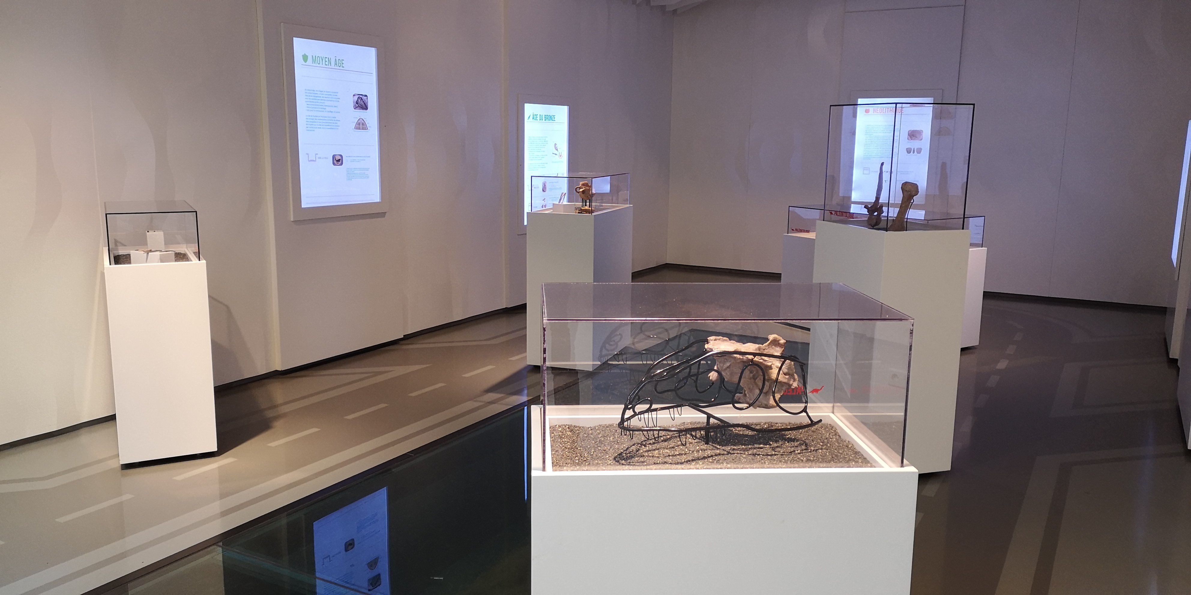 Exposition archéologique de l'aire des Terrasses de Provence (anciennement aire de Cambarette Sud) sur l'autoroute A8